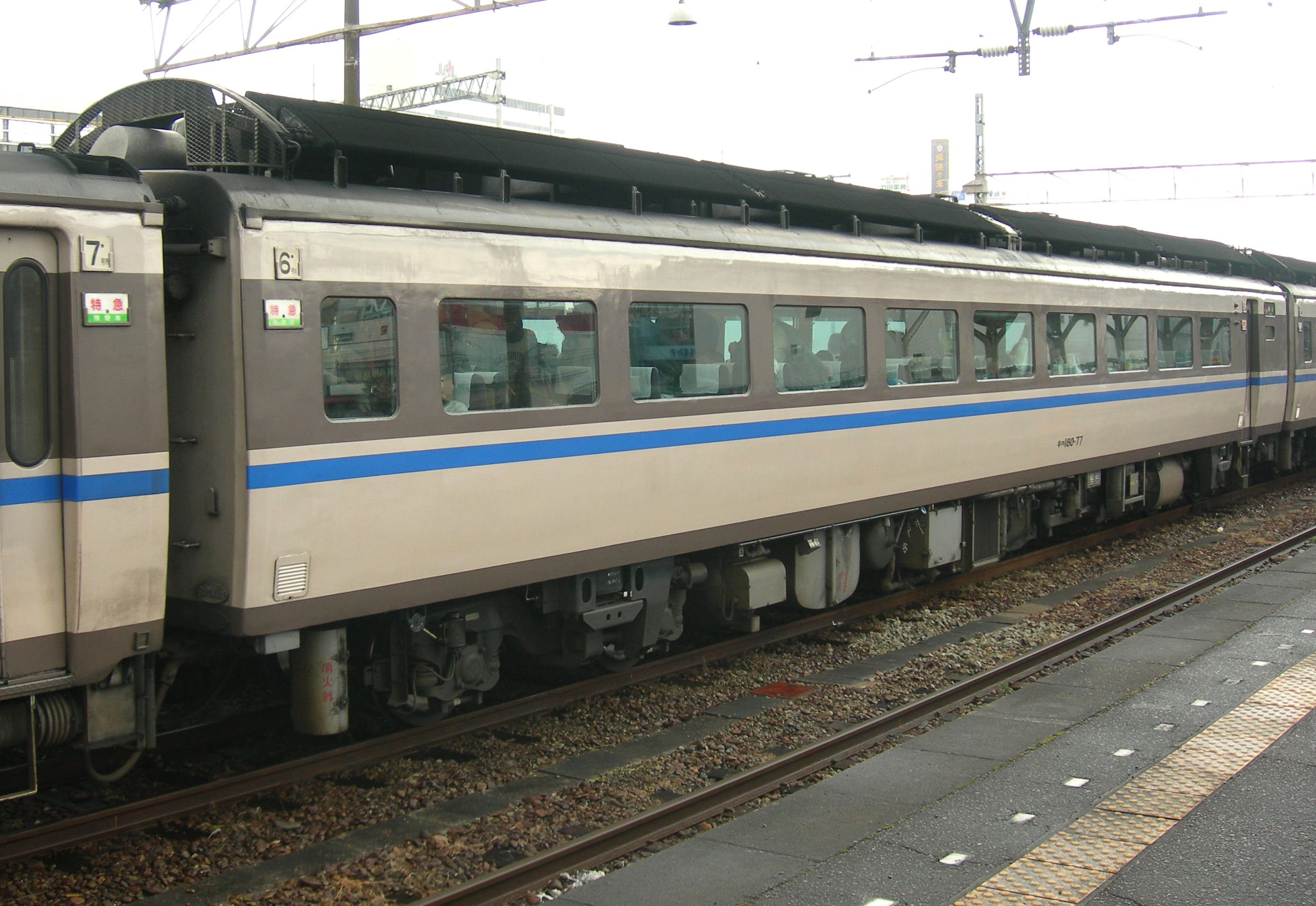 国鉄キハ181系気動車キハ180-77